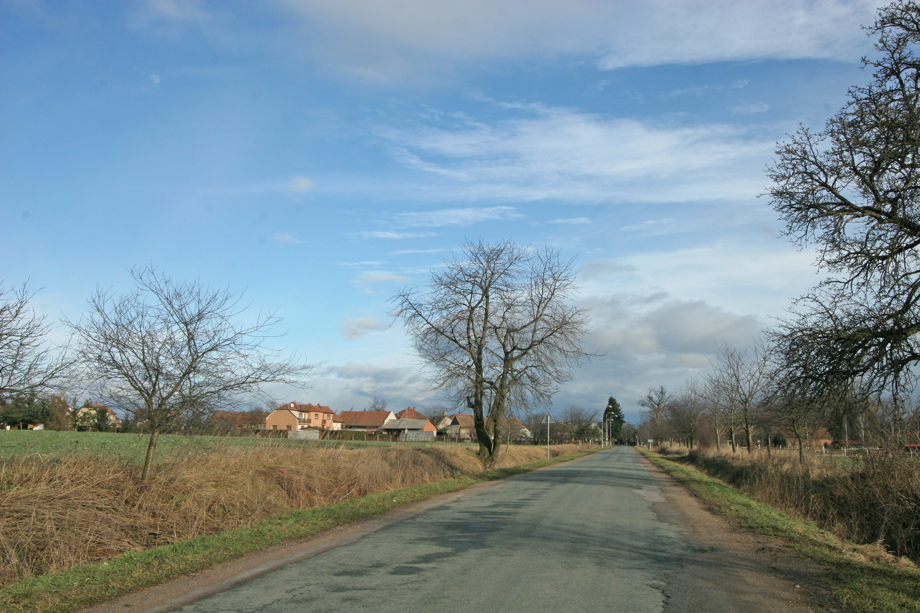 Puchlovice příjezd od Roudnice